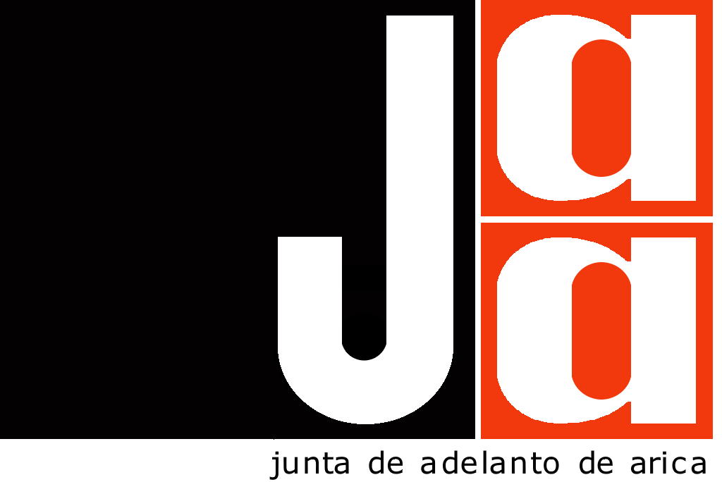 Logo de Junta de Adelanto de Arica